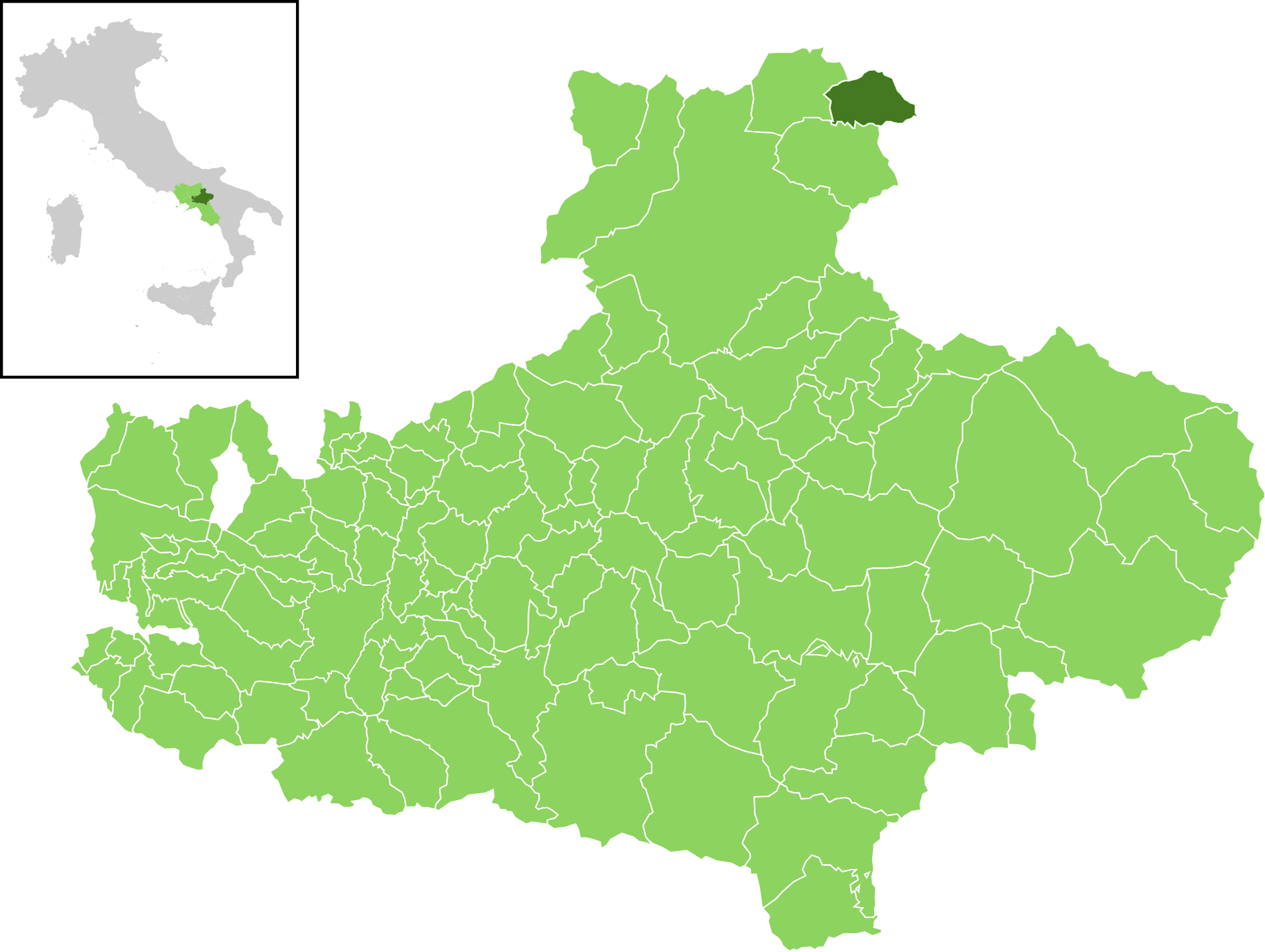 Posizione del Comune di Montaguto